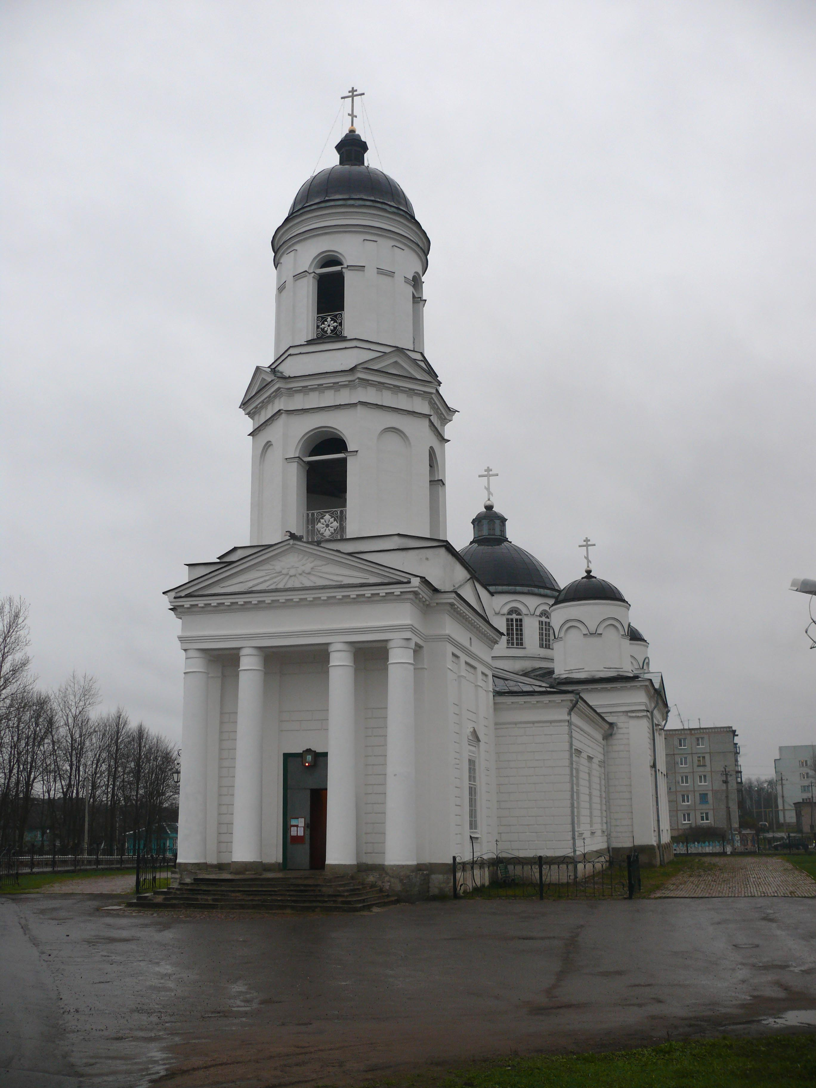 Ильинский собор в Сольцах, Новгородская область